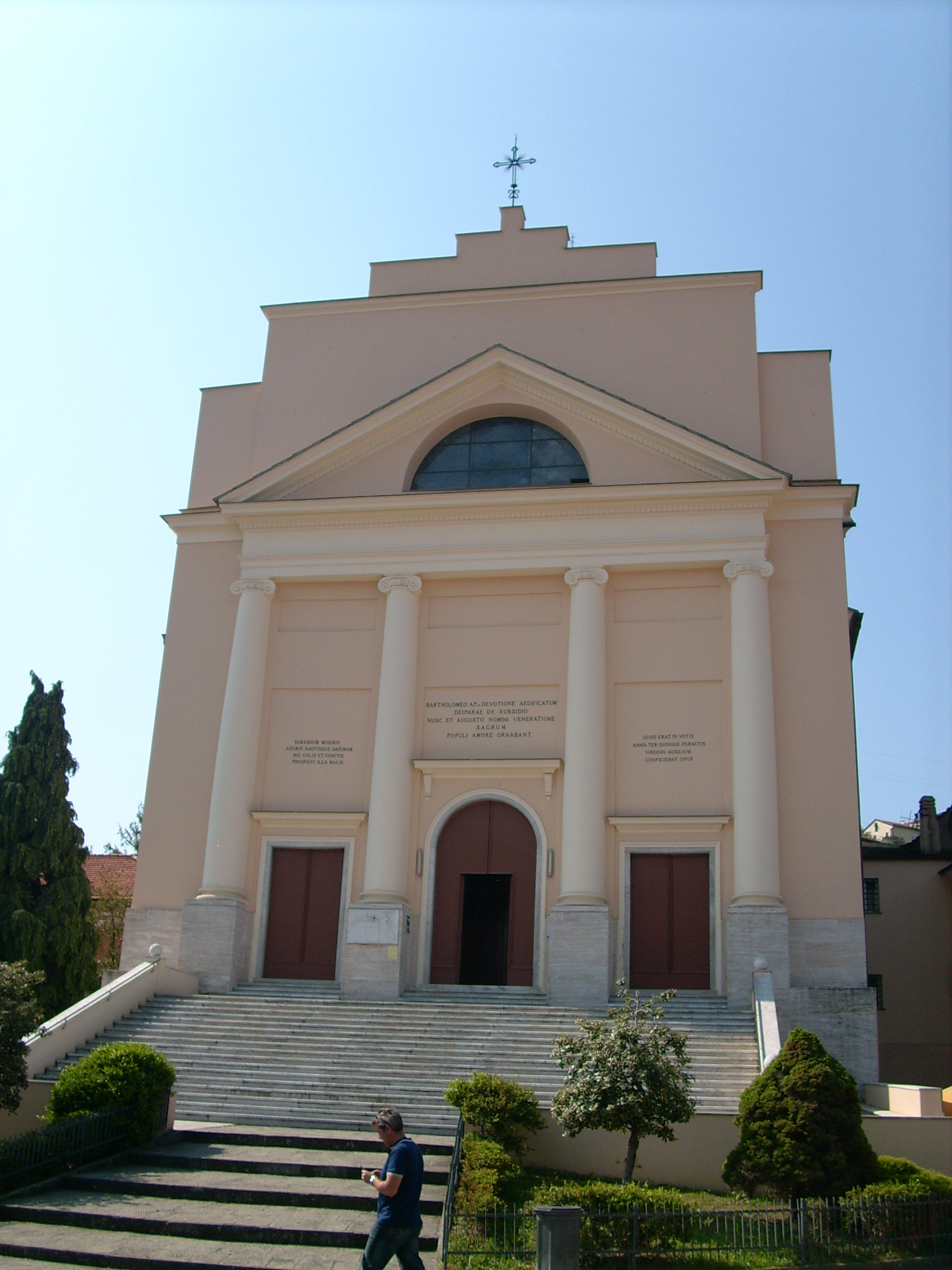 Chiesa di San Bartolomeo della Ginestra a Sestri Levante, Liguria, Italia